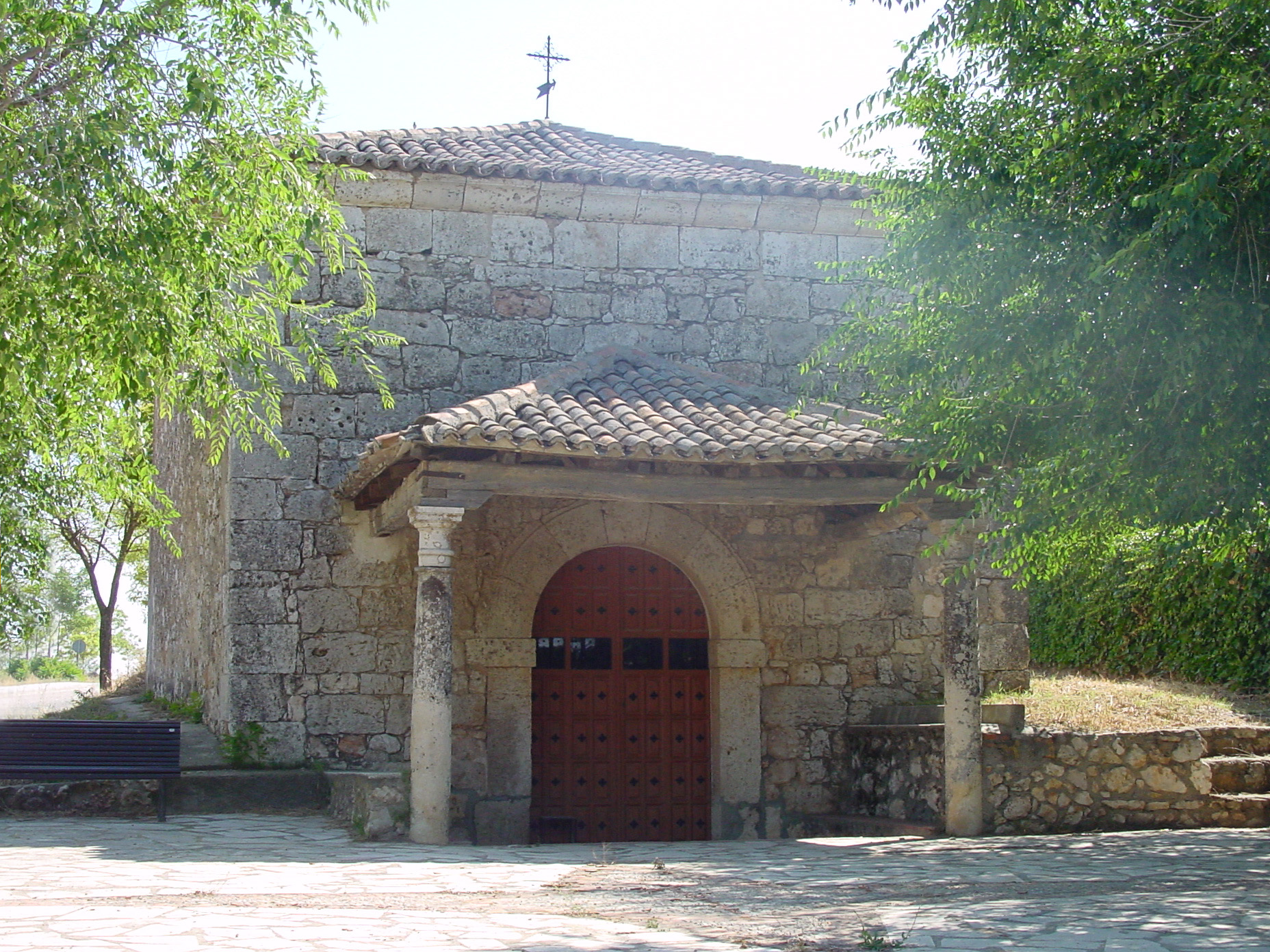 Ermita en Los Santos de la Humosa.